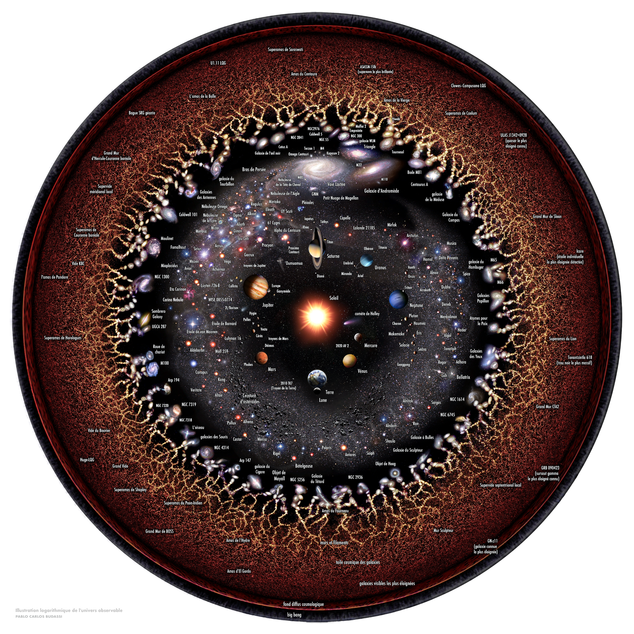 Conception à l'échelle logarithmique de l'univers observable avec le système solaire au centre, les planètes intérieures et extérieures, les objets de la ceinture de Kuiper, Alpha Centauri, le bras de Persée, la galaxie de la voie lactée, la galaxie d'Andromède, les galaxies voisines, le Web cosmique, le rayonnement micro-ondes cosmique et le Big Bang invisible plasma sur le bord. La distance de la Terre augmente de façon exponentielle du centre vers le bord. Les corps célestes sont agrandis pour apprécier leurs formes.